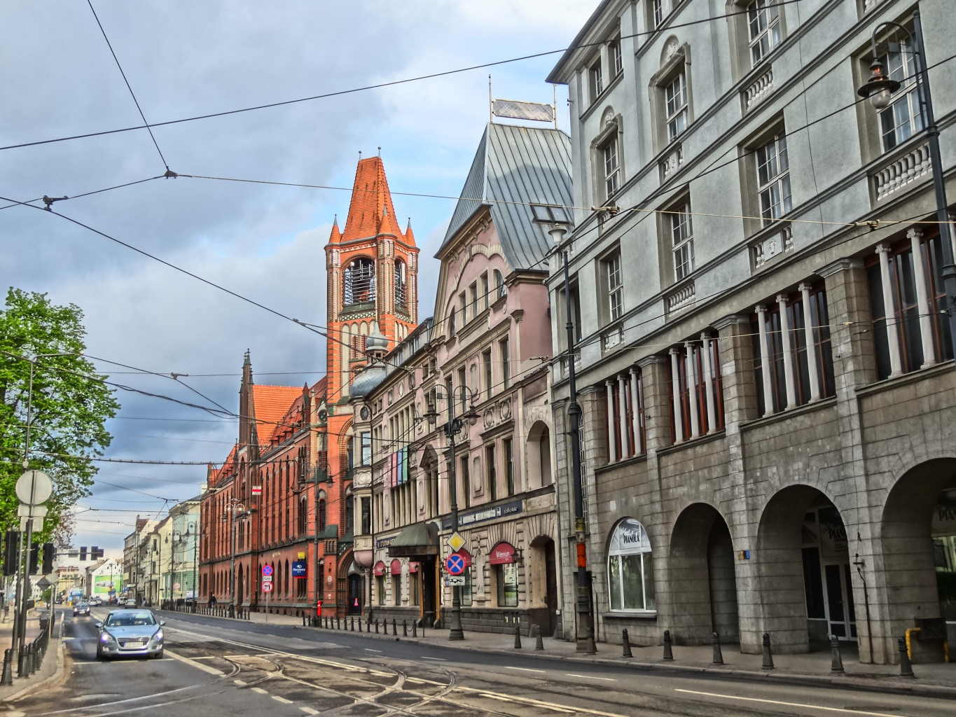 Ulica Jagiellońska w Bydgoszczy, nr 1-5